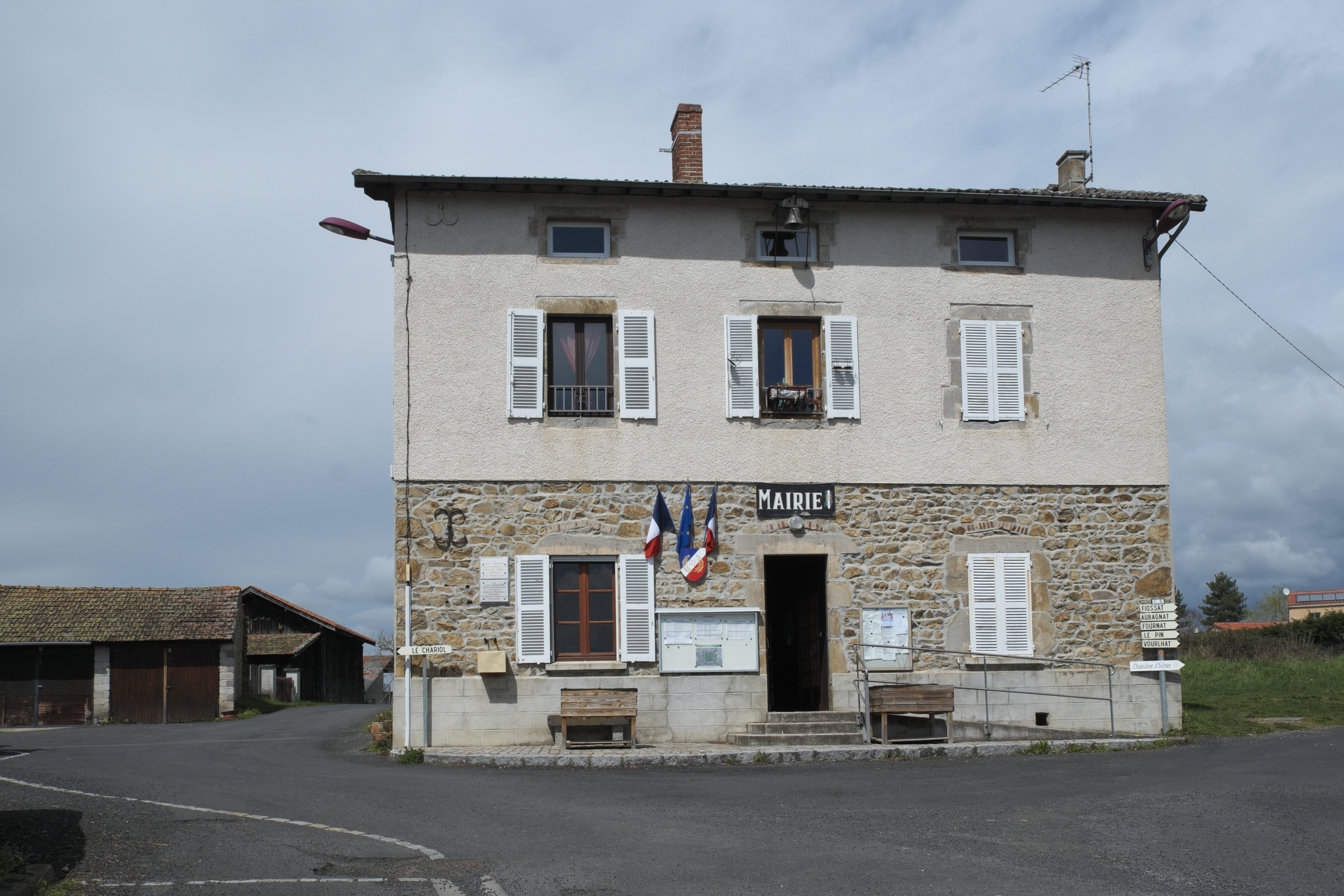 Mairie (Rathaus) in Frugières-le-Pin im Département Haute-Loire (Auvergne-Rhône-Alpes/Frankreich)